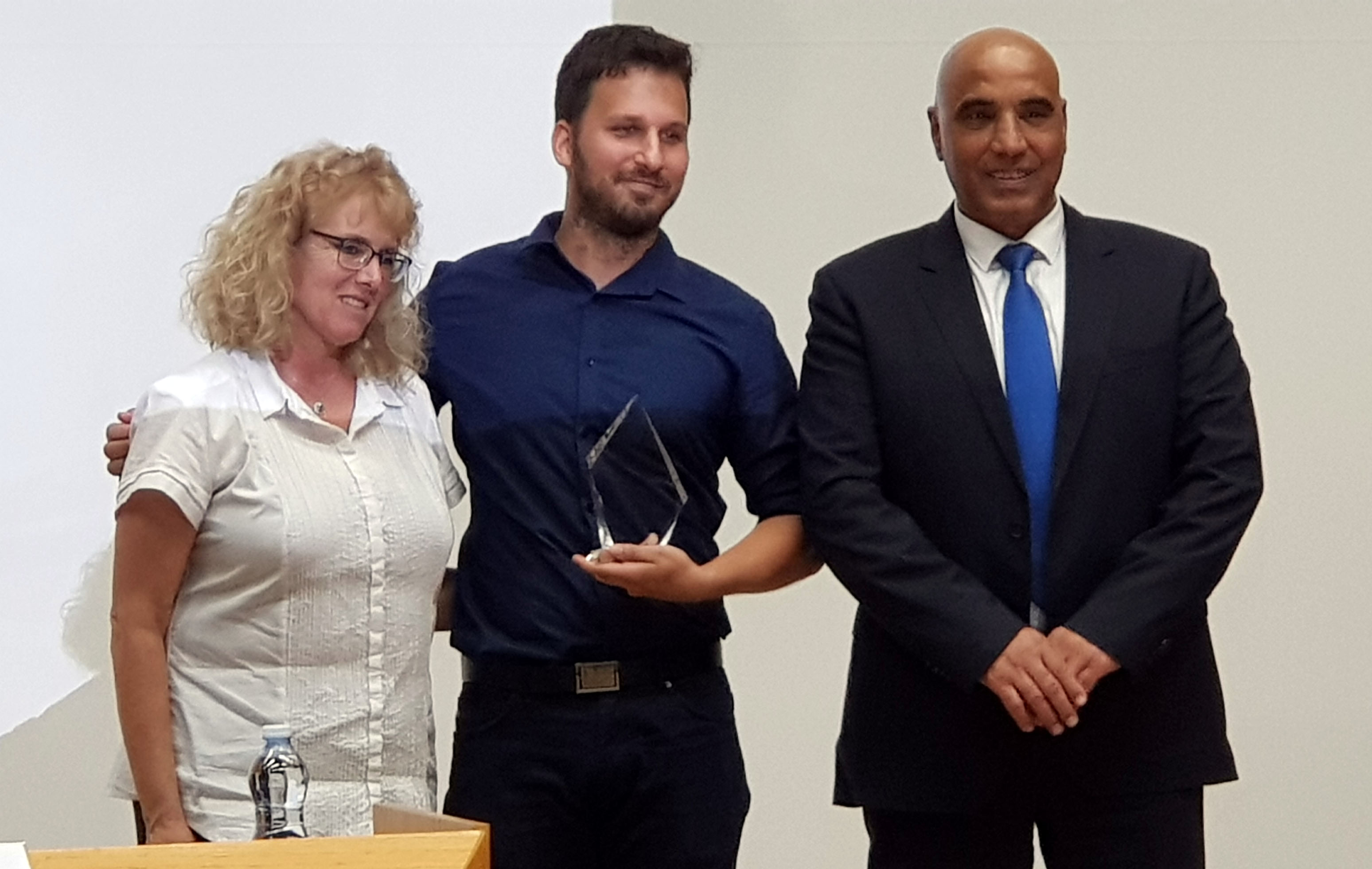 יאיר נתיב, מייסד מיזם "שומרי הדרך", מקבל תעודת הוקרה מיושב ראש השדולה למאבק בתאונות הדרכים, חבר הכנסת חמד עמאר וממנכ"לית הרשות הלאומית לבטיחות בדרכים, עורכת דין רחל טבת-ויזל, נובמבר 2018